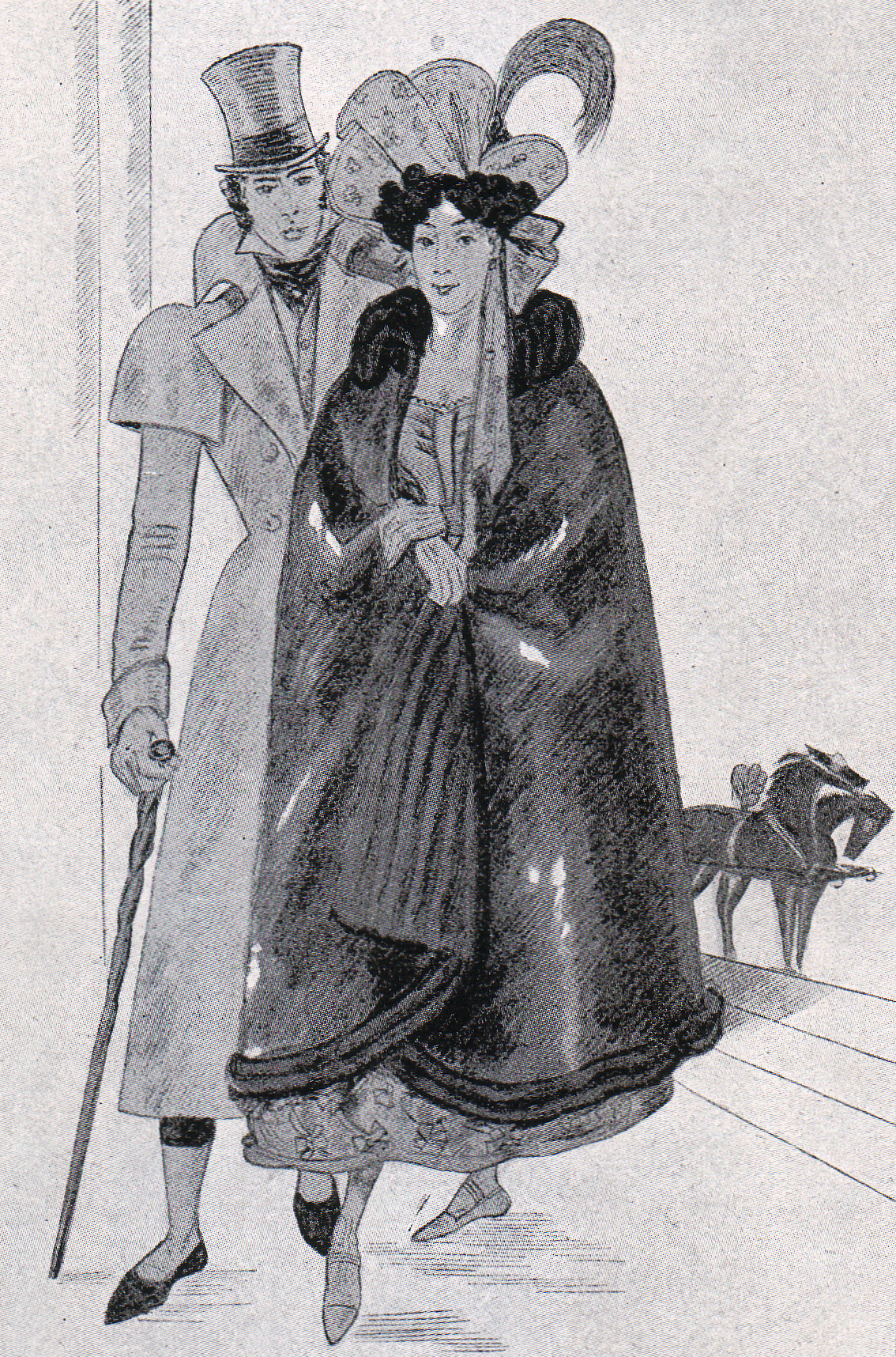 Cape en cette nouvelle fourrure appelée loutre de mer, bordie et doublée de Zibeline, Mme. Fouché. Beret de gaze foulard du magazin de Mme. Fouché, rue Vivienne n. 2 bis. Gravure de la Collect. Joannard Frères, Lyon.